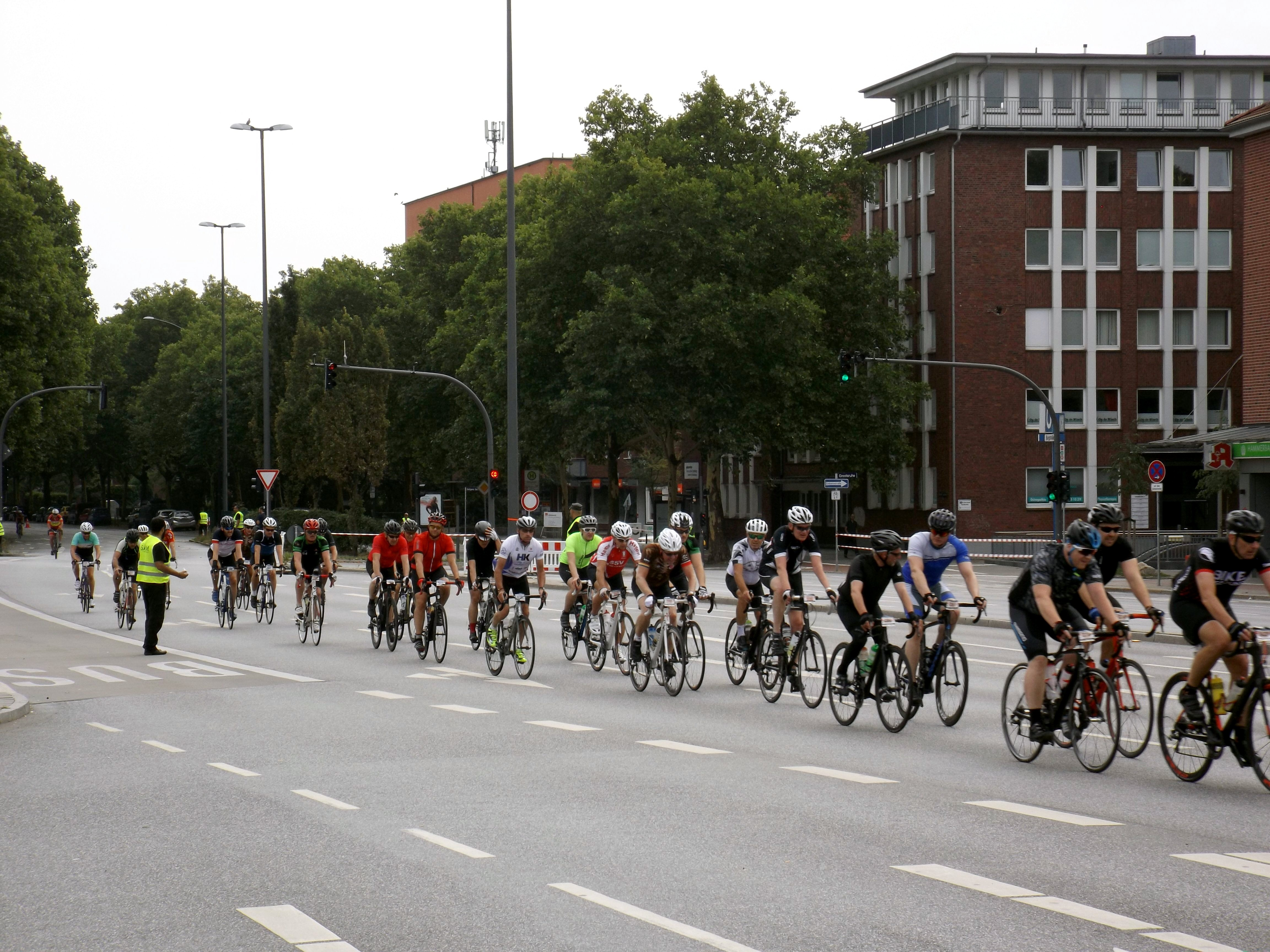 Jedermannrennen bei den Cyclassics 2018, in der Hammer Landstraße in Hamburg-Hamm